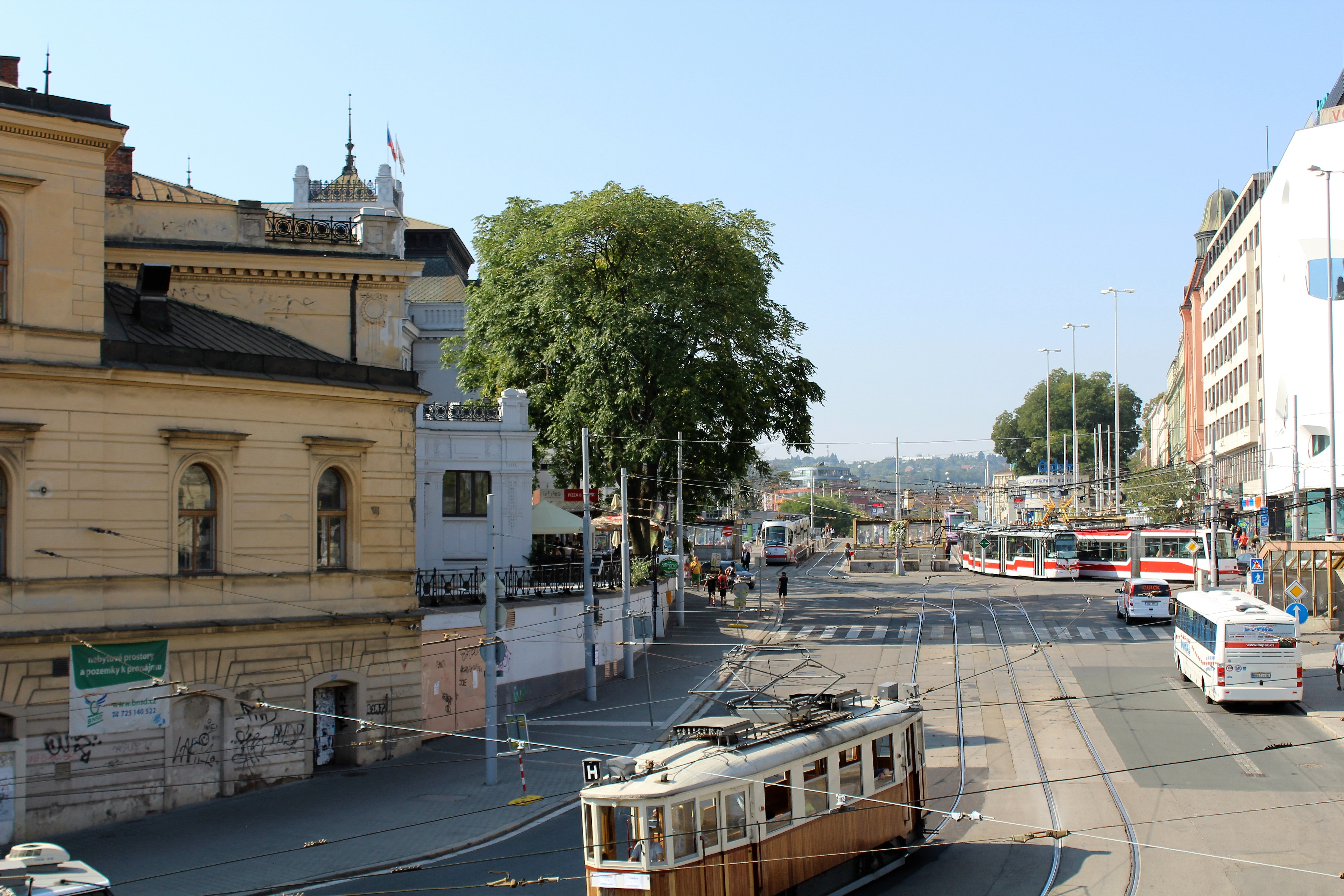 Nádražní třída, Brno od západu k východu